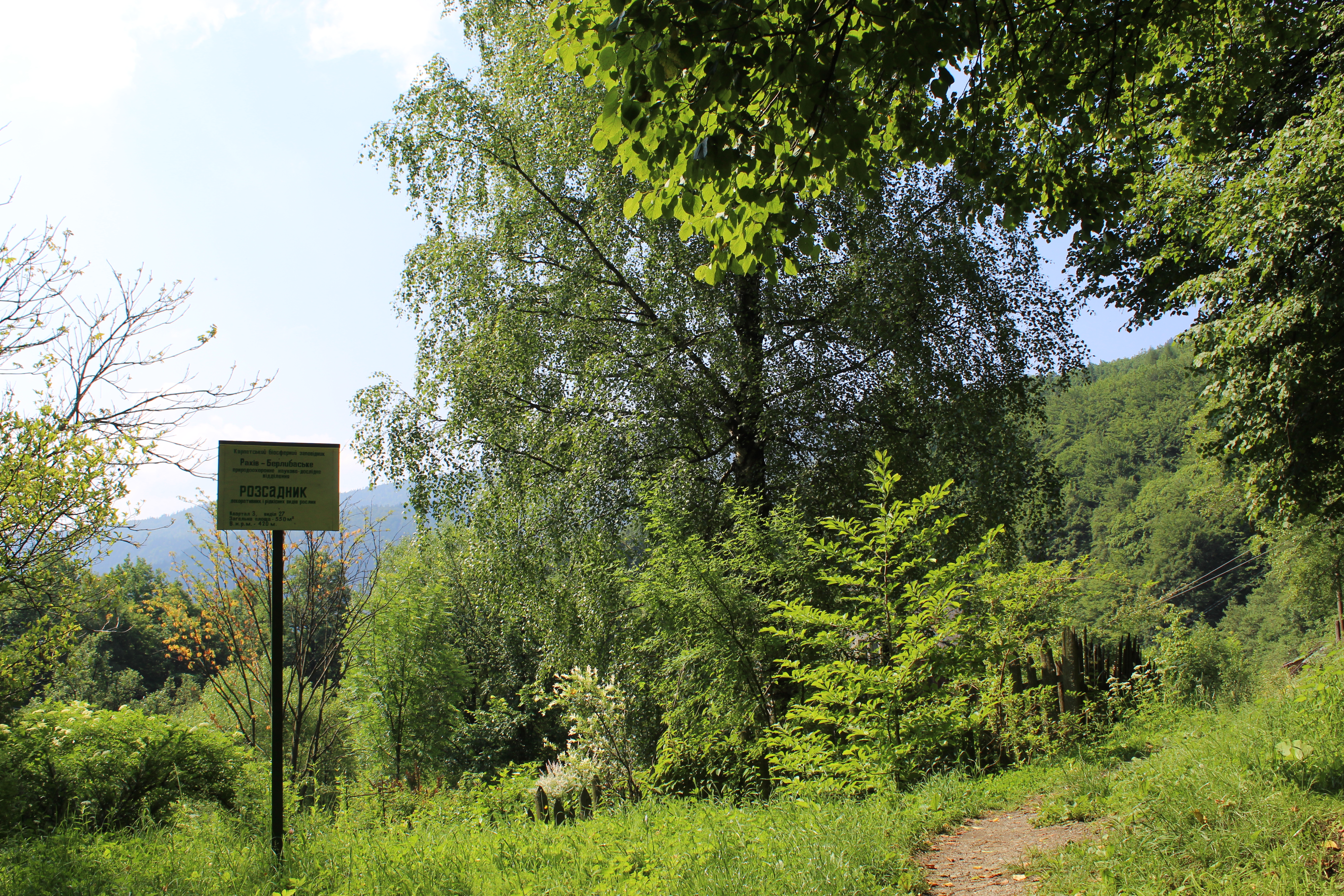 Розсадник на території Карпатського біосферного заповідника. Вікіекспедиція